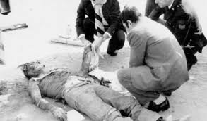 Il ritrovamento del corpo di Pier Paolo Pasolini Licensing 1975